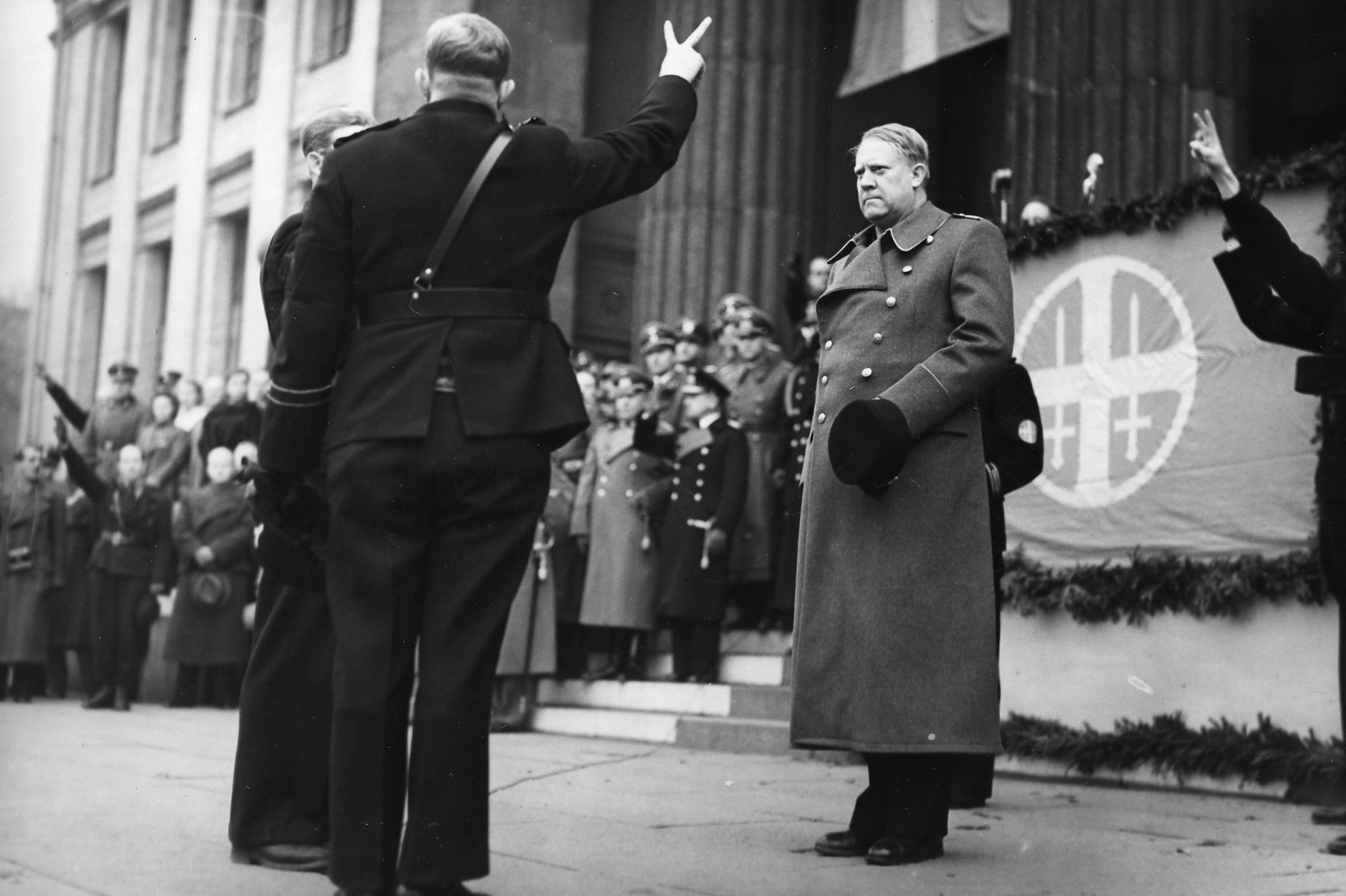 1941/11/01. RA/RAFA-3309/U 38B/9/38-9-5 (img133)